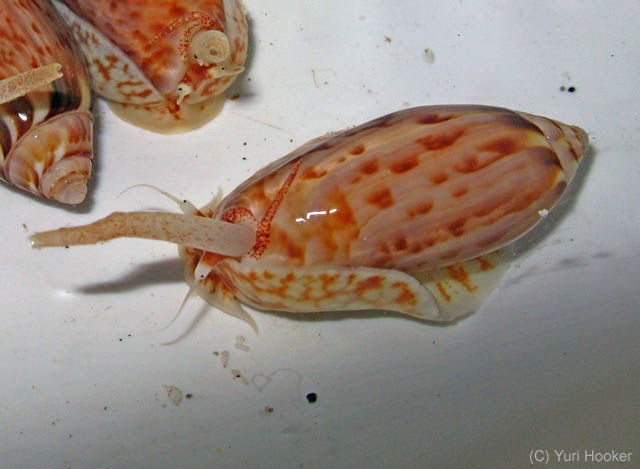 Oliva kaleontina recolectada en isla Foca, Perú, a 4 metros de profundidad, debajo de arena fina.